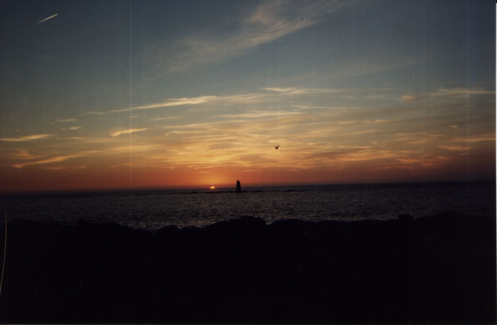 Tourelle-balise des Chiens Perrins, Île d'Yeu (Vendée, Pays de Loire, France)